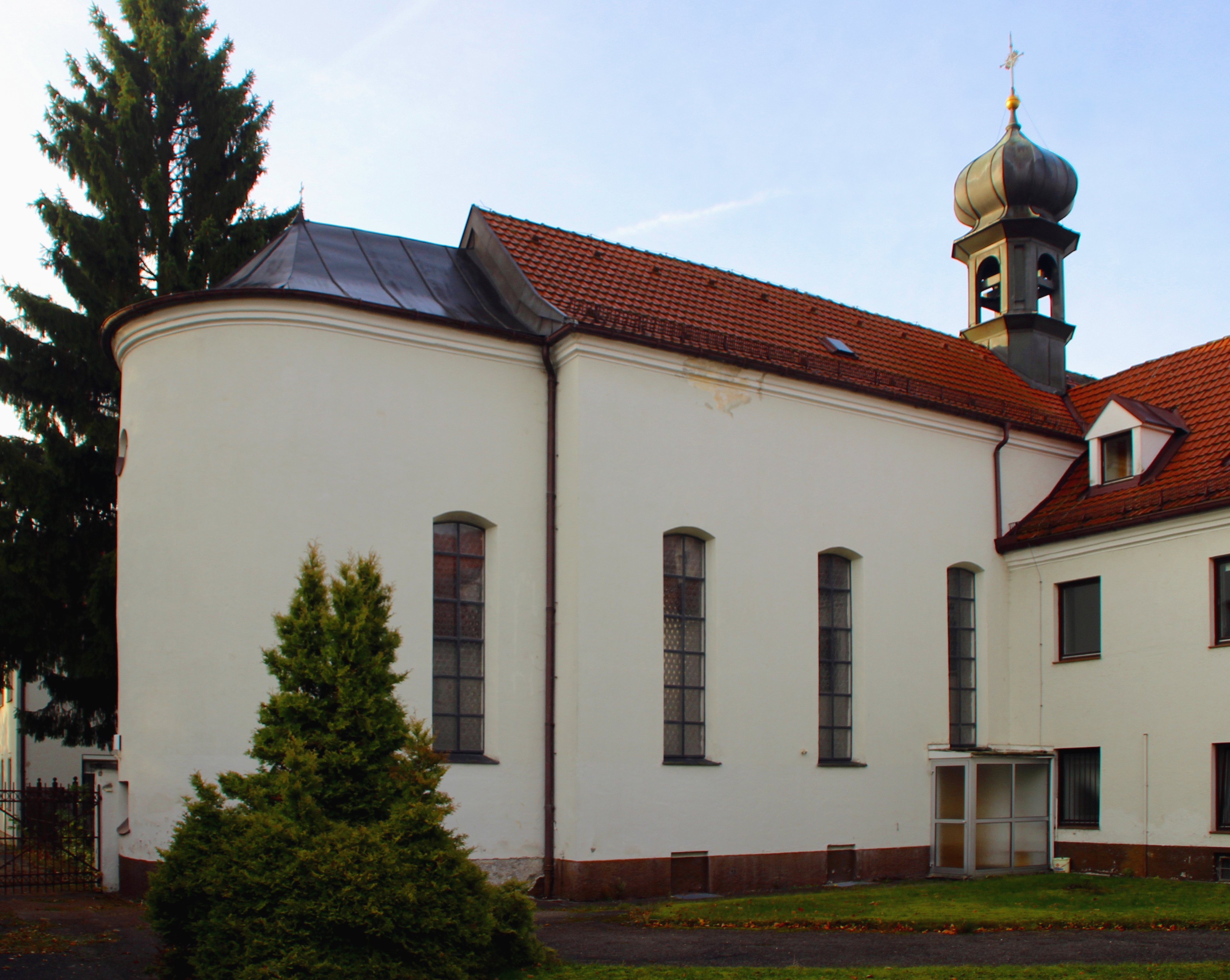 Kapelle St. Anna des Frauenklosters in Lenzfried (Kempten)